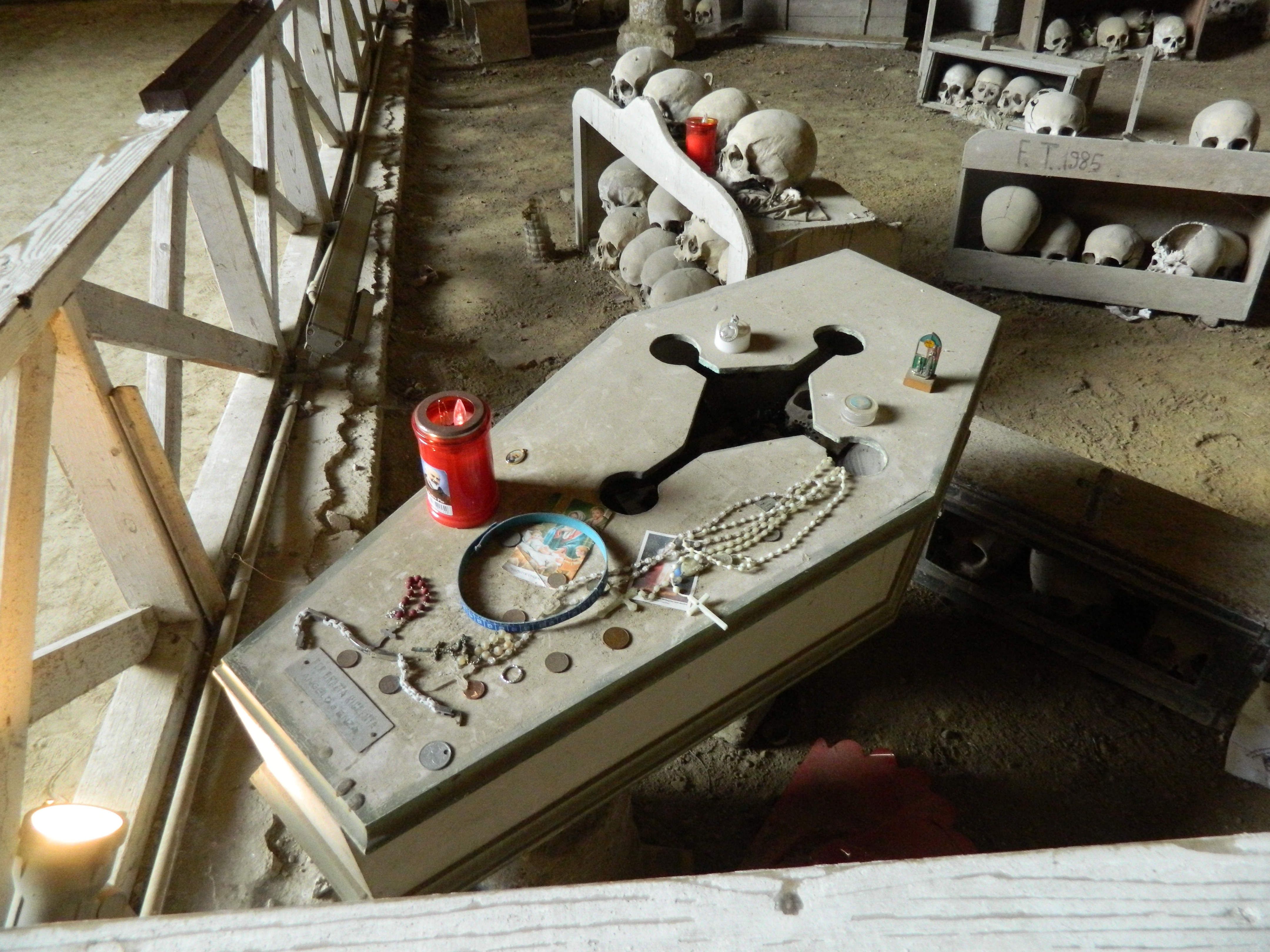 Cimitero delle Fontanelle (Napoli) - Galleria centrale, una bara Per Grazia Ricevuta.